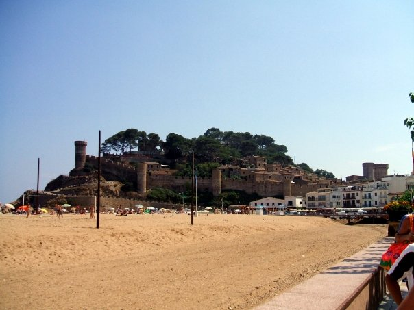 Spiaggia di Tossa de Mar